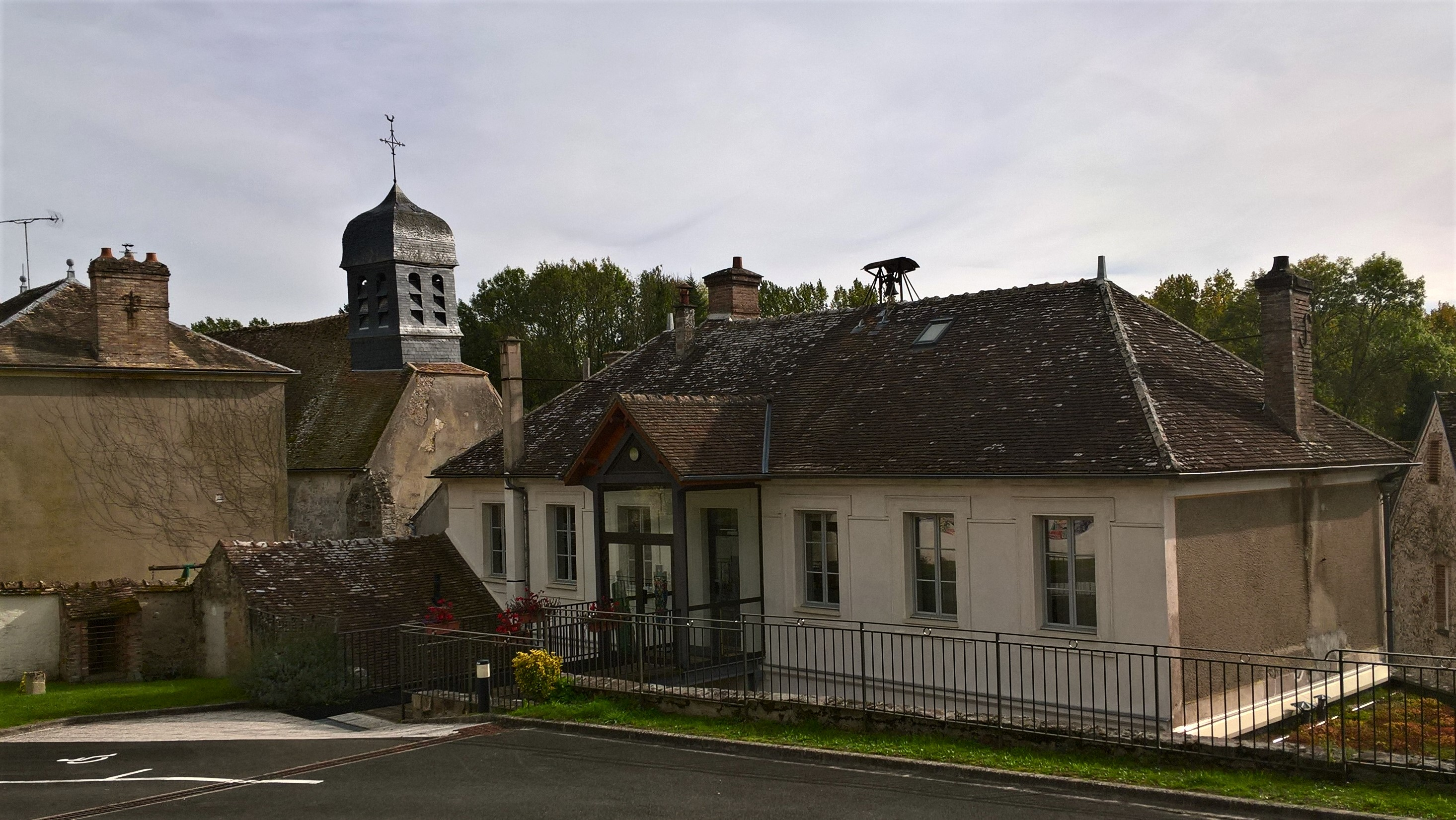 Blennes, mairie